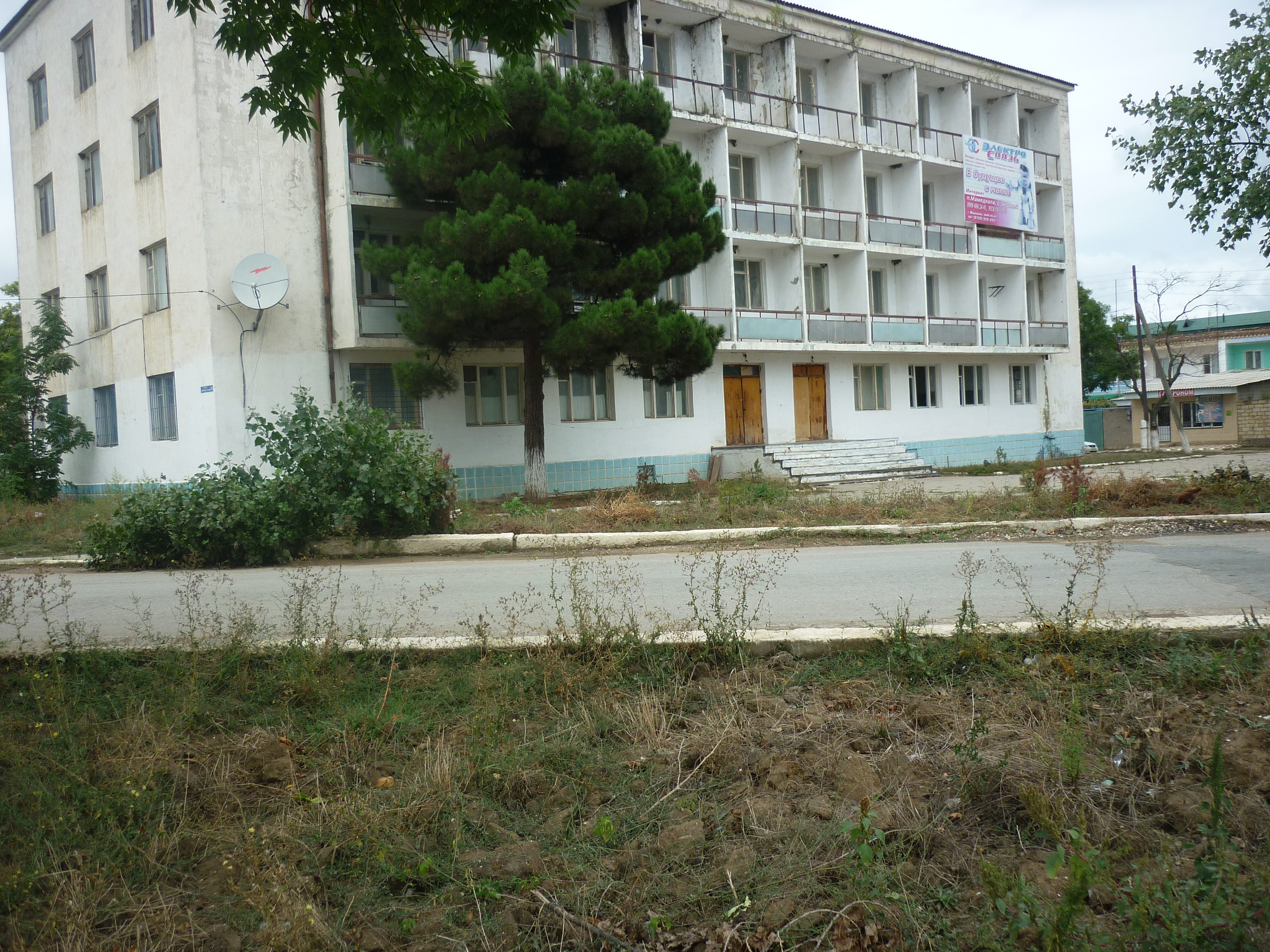 Общежитие_п.Мамедкала